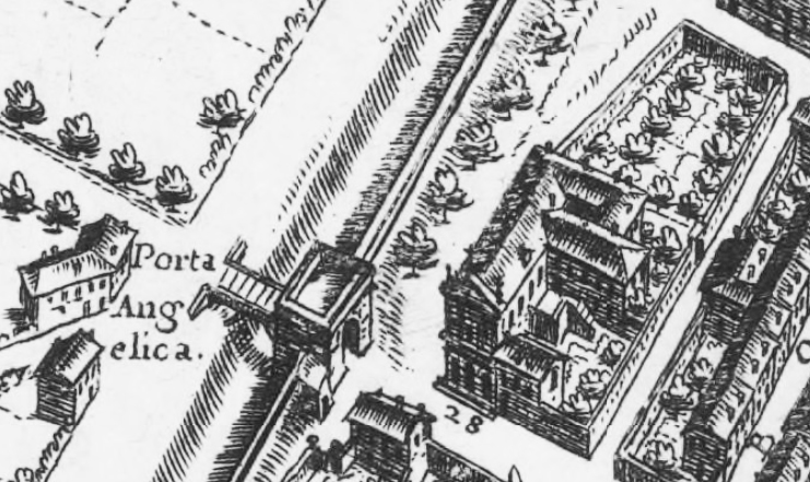 Porta Angelica e chiesa dell'Ascensione (poi di Santa Maria delle Grazie) nella pianta di Roma di Giovanni Battista Falda (1676).